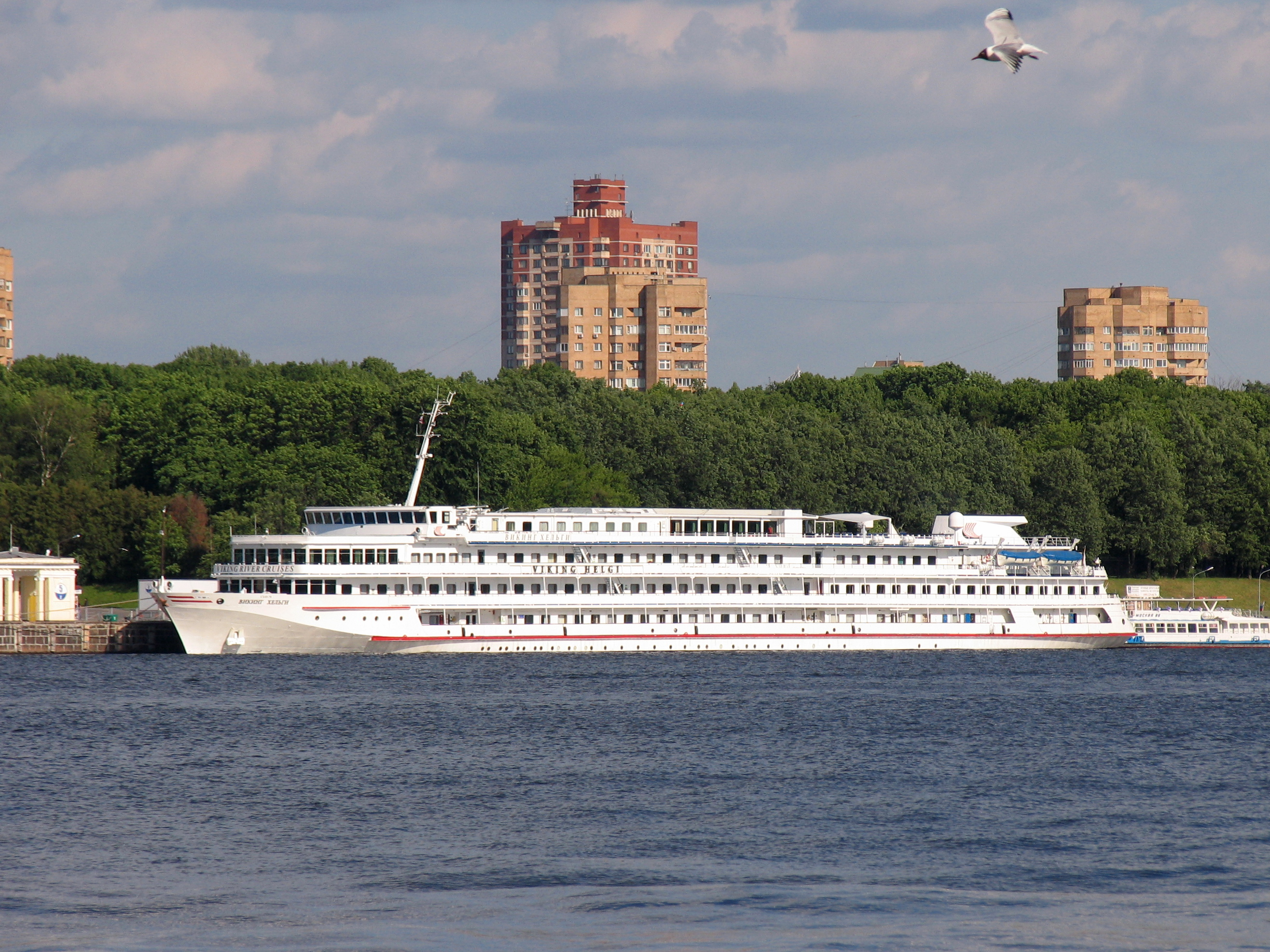 Речное круизное судно Викинг Хельги в Северном речном порту